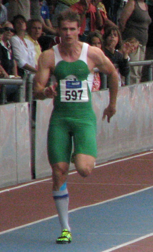 Sven Knipphals beim DLV WM-Testwettkampf 2011 im Stadion der MTG Mannheim.